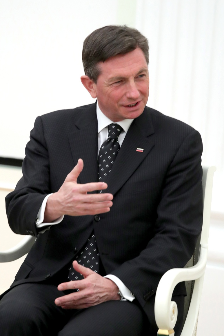 Президент Республики Словении Борут Пахор во время встречи с Президентом России Владимиром Путиным